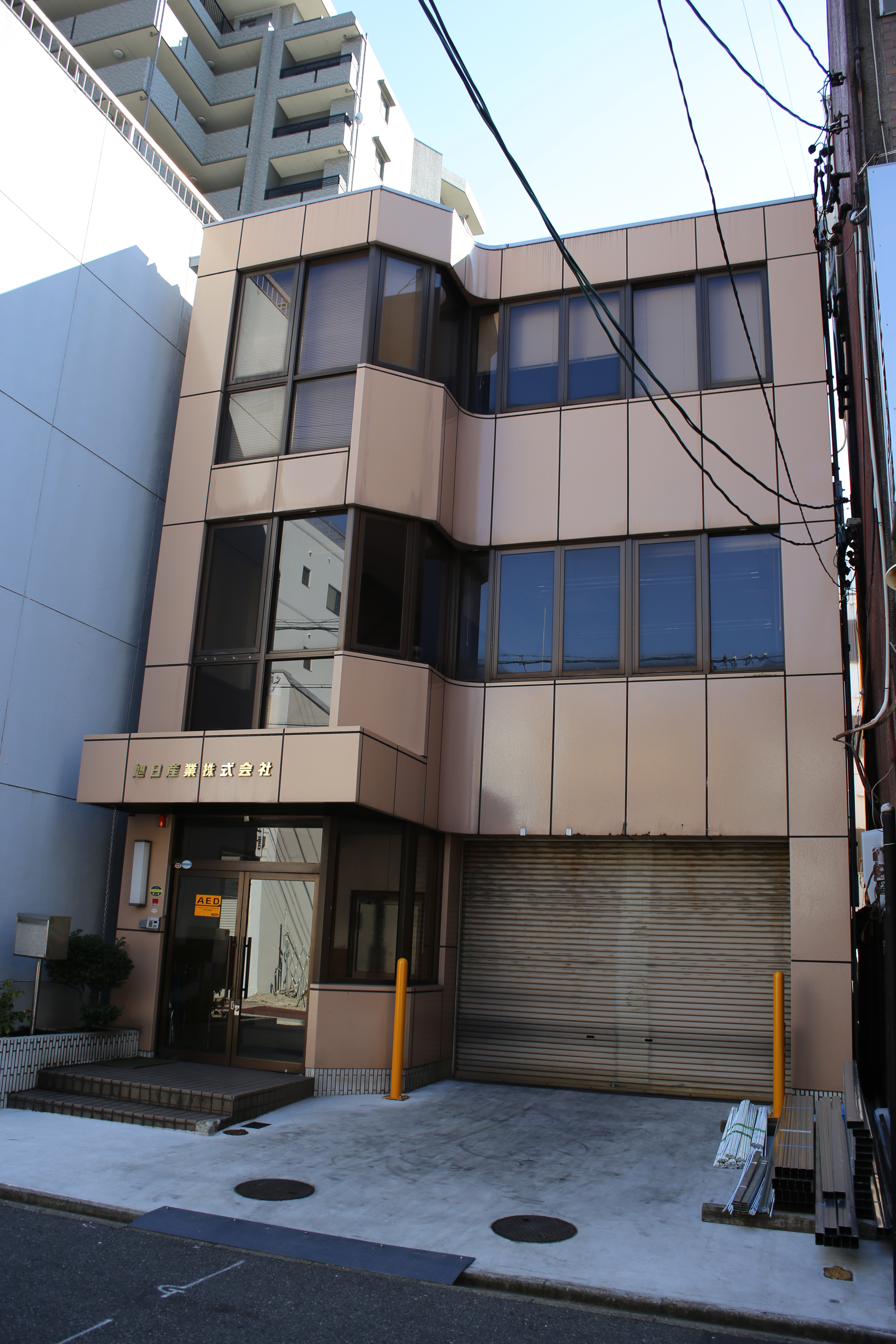 名古屋市中区新栄一丁目の旭日産業本社を北側公道西側より撮影